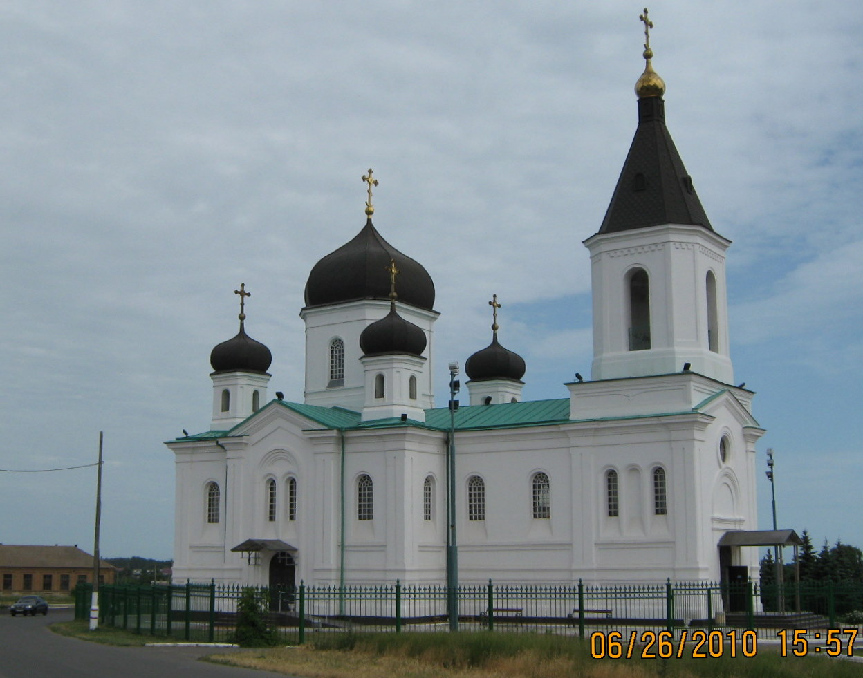 Церква в Урзуфі